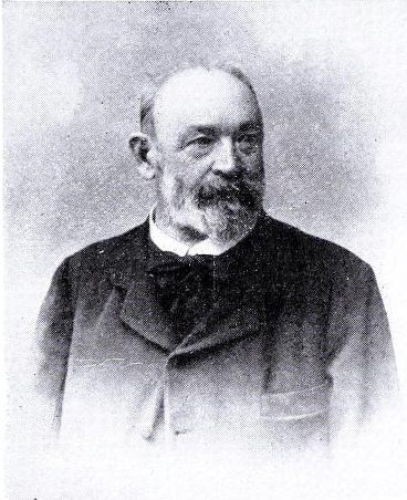 Ritratto di Antonio Tagliaferri (1835-1909), architetto